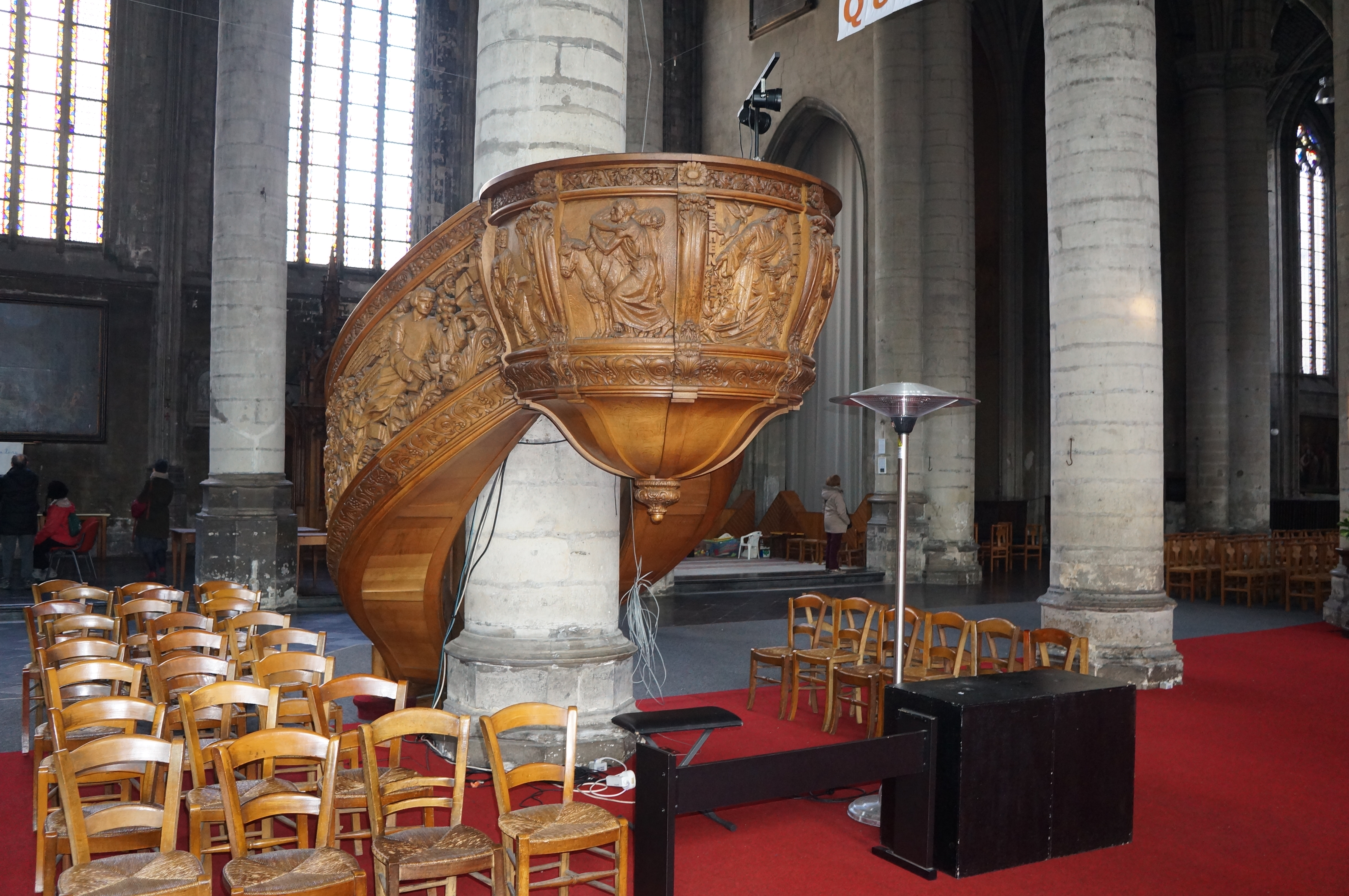 Lille (Nord, Hauts-de- France), église St Maurice, chaire en bois sculpté en chêne du Japon, par Fernand (1890-1951) et Madeleine Weerts (1901-1977), sculpteurs à Mons-en-Barœul, et terminée par cette dernière seule, après la mort de son mari; inaugurée le 28 juin 1951.